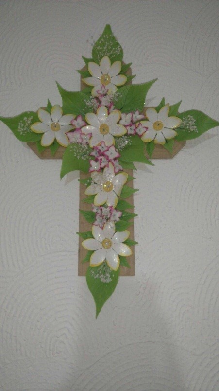 Ejemplo de migajón florar.